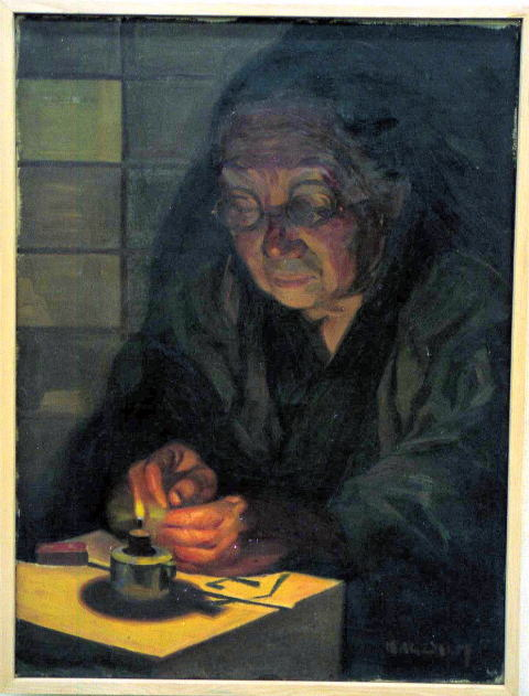 宮地志行「ランプ」（モデル：宮地はん）